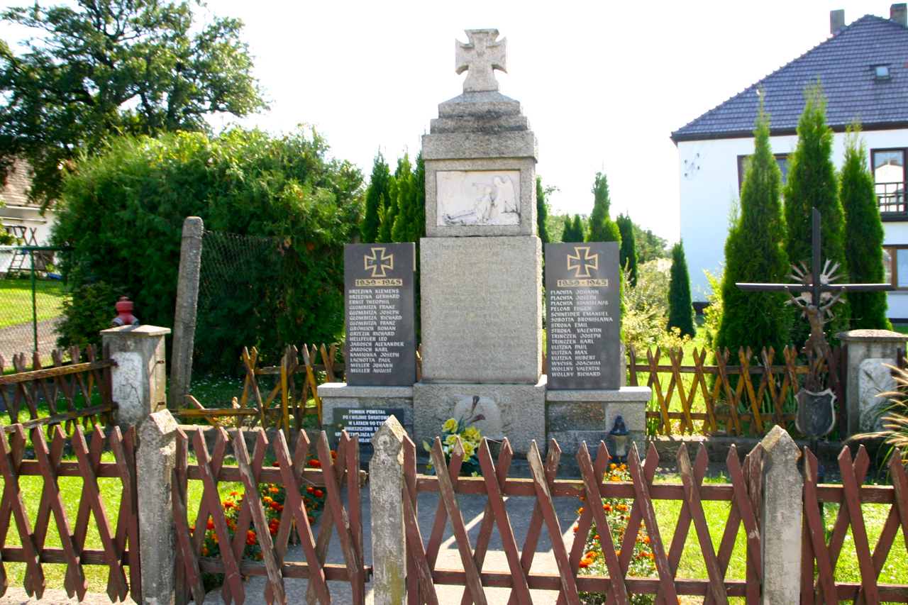 Solec (dodatkowa nazwa w j. niem. Altzülz) – wieś w Polsce położona w województwie opolskim, w powiecie prudnickim, w gminie Biała.